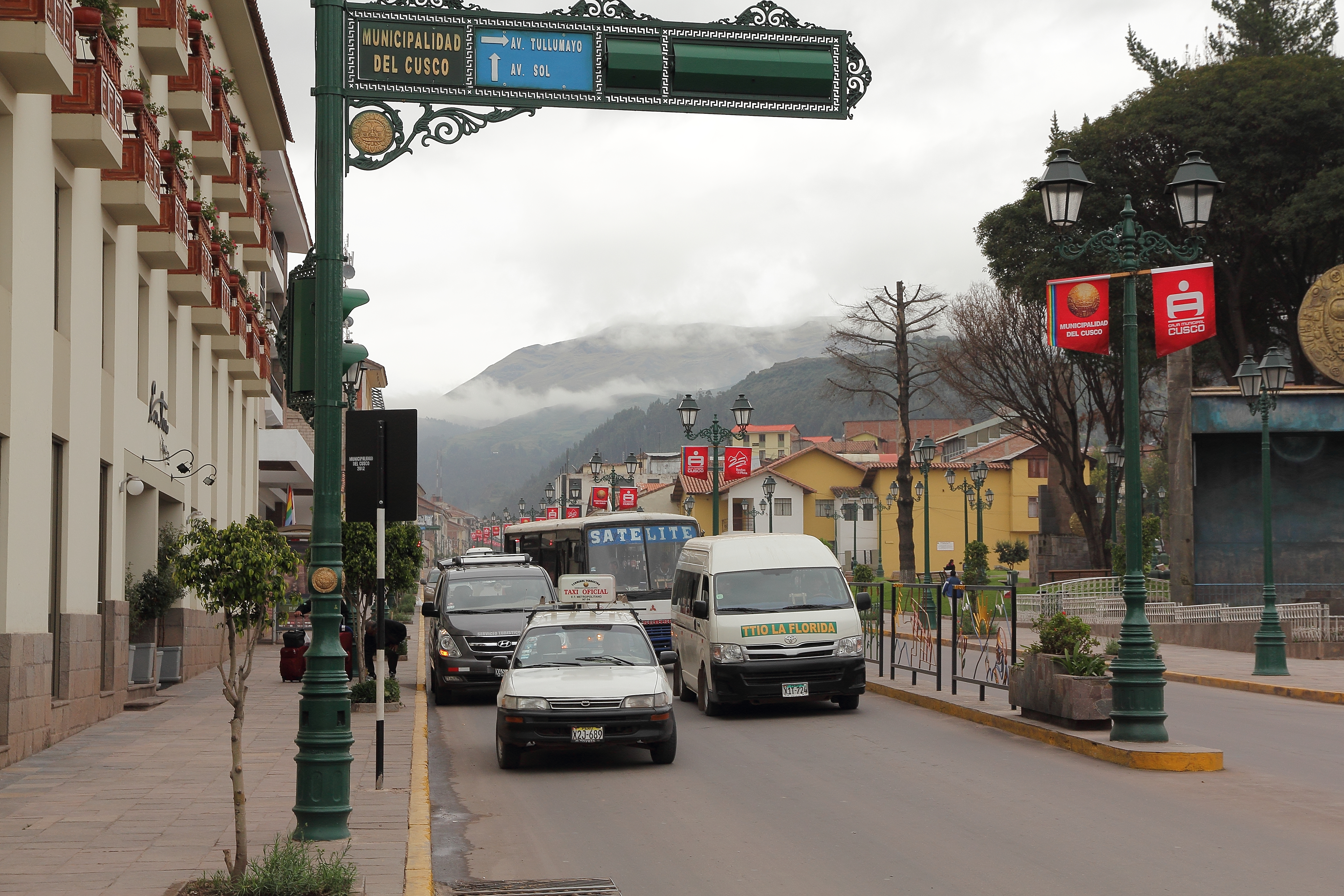 Cusco, Peru.